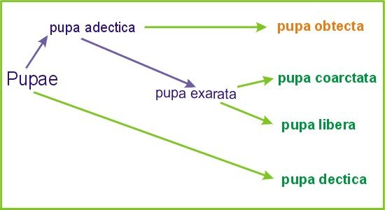 Pupae (pupa) Typy poczwarek u owadów